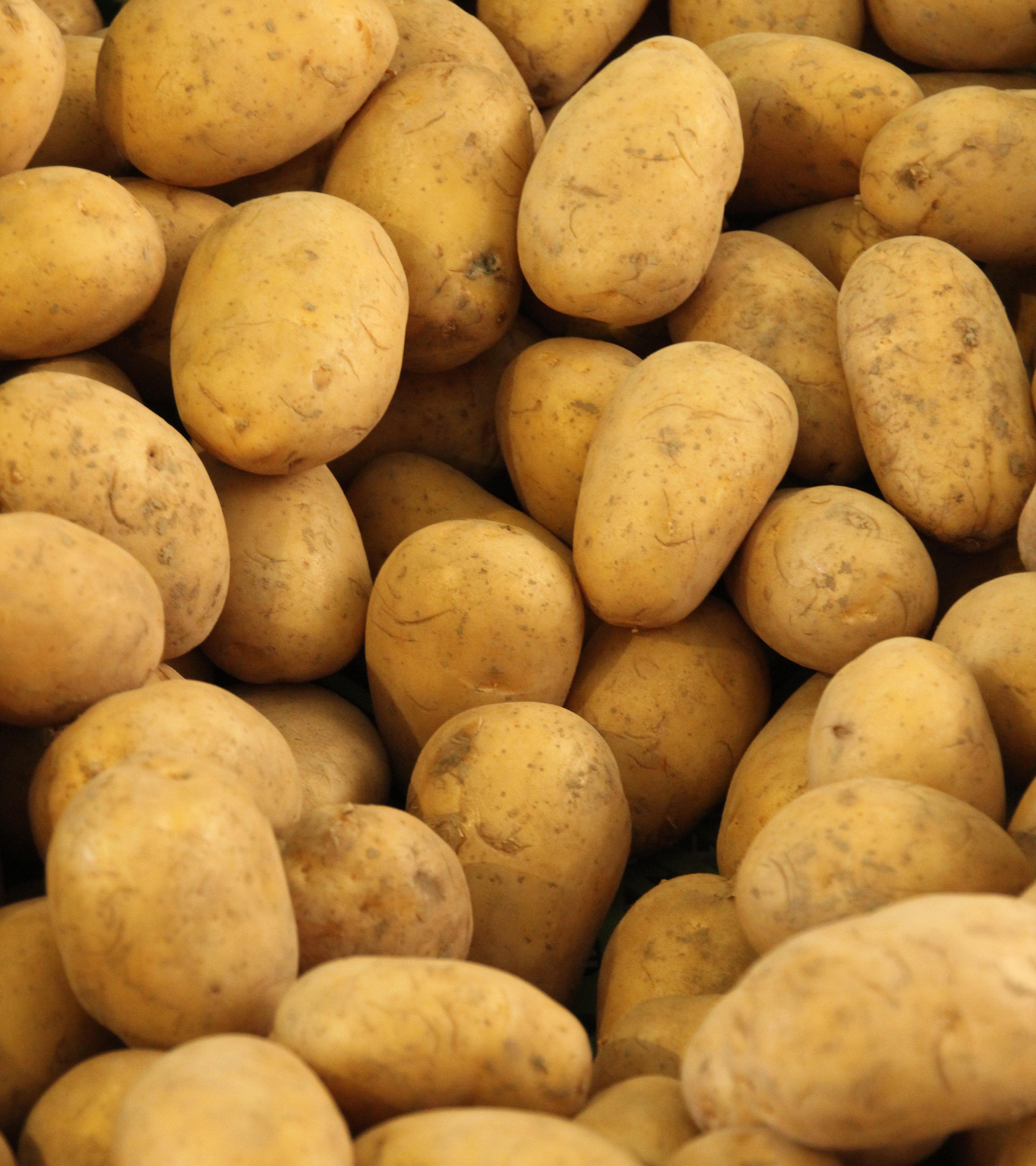 Bildinhalt: Kartoffeln der Sorte Campina Aufnahmeort: Frankfurt am Main, Deutschland